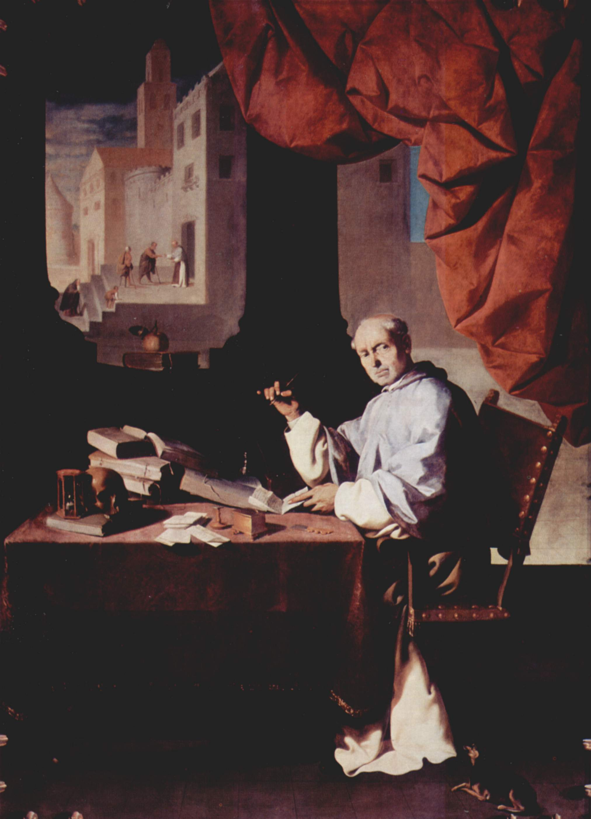 Retrato póstumo del prelado español Fray Gonzalo de Illescas († 1464), que llegó a ser obispo de Córdoba y prior del Real Monasterio de Santa María de Guadalupe.